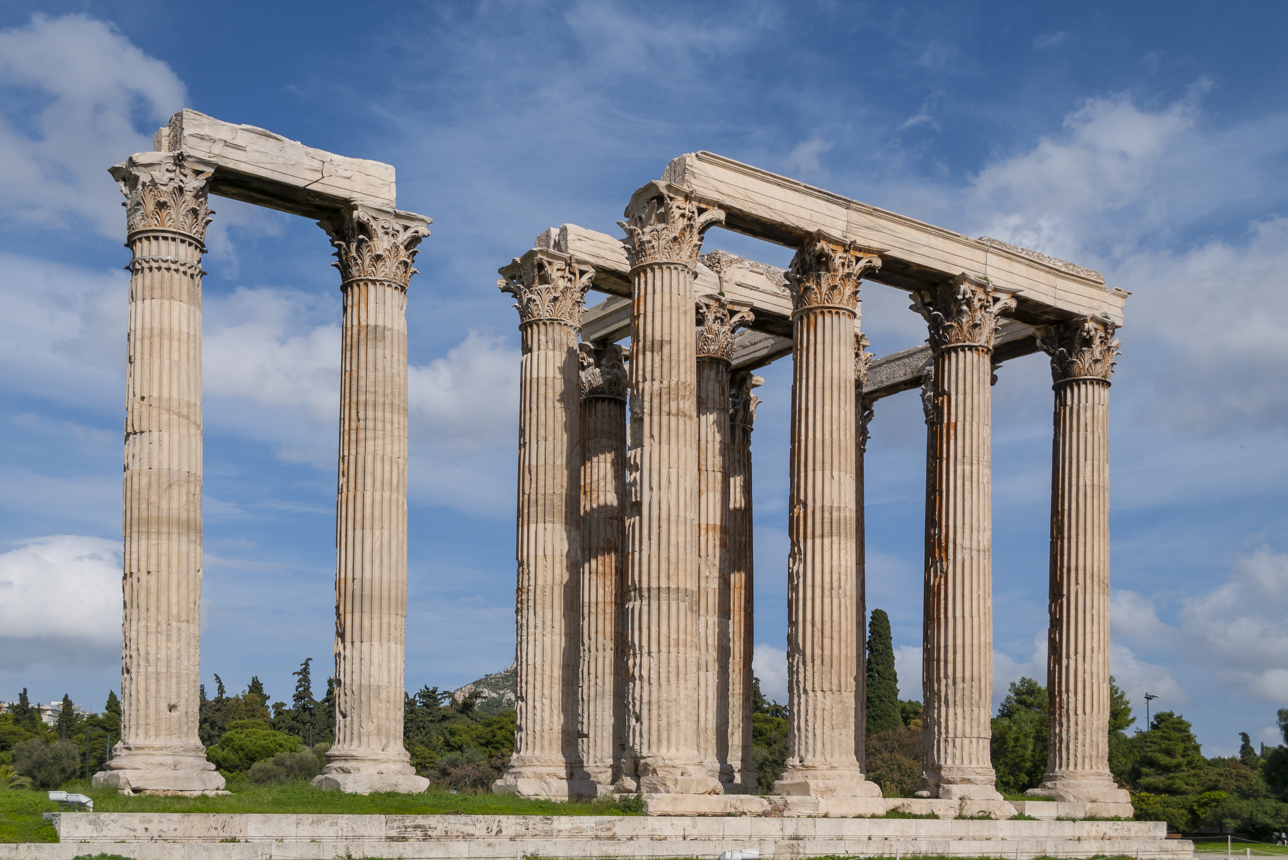 Ναός Ολυμπίου Διός«Ναός του Ολυμπίου Διός»